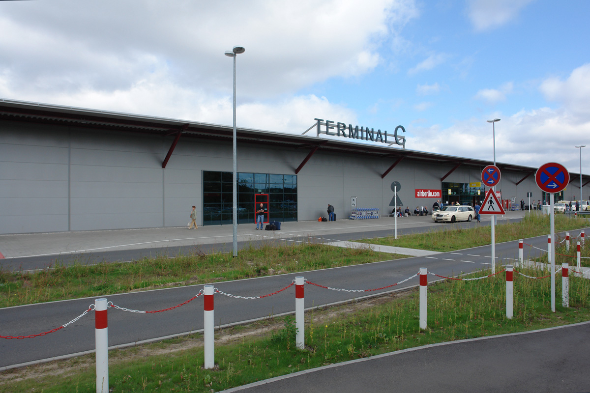 Der neu errichtete Terminal C des Flughafens Berlin Tegel (TXL/EDDT).